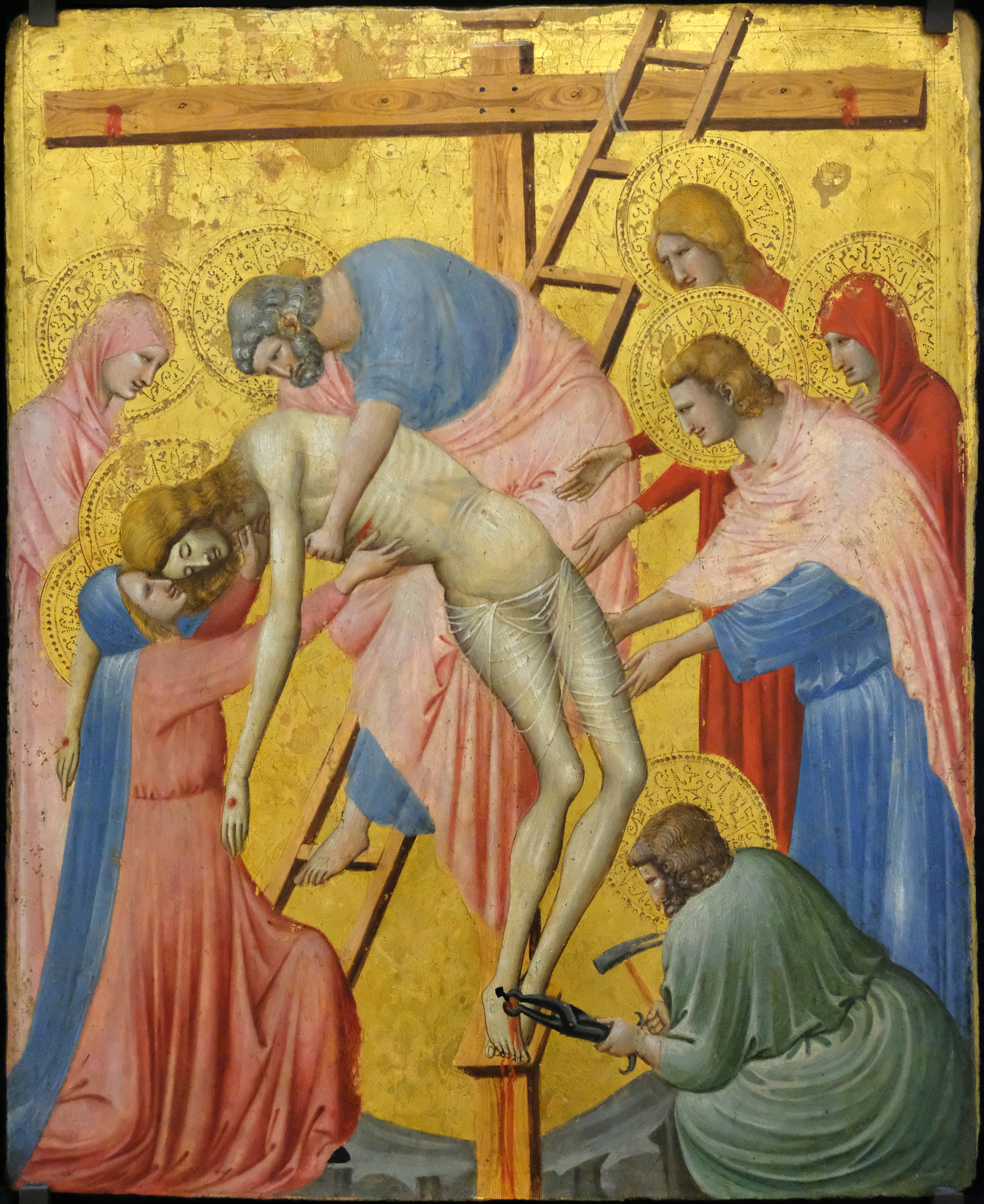 The Deposition ou La Déposition de Croix